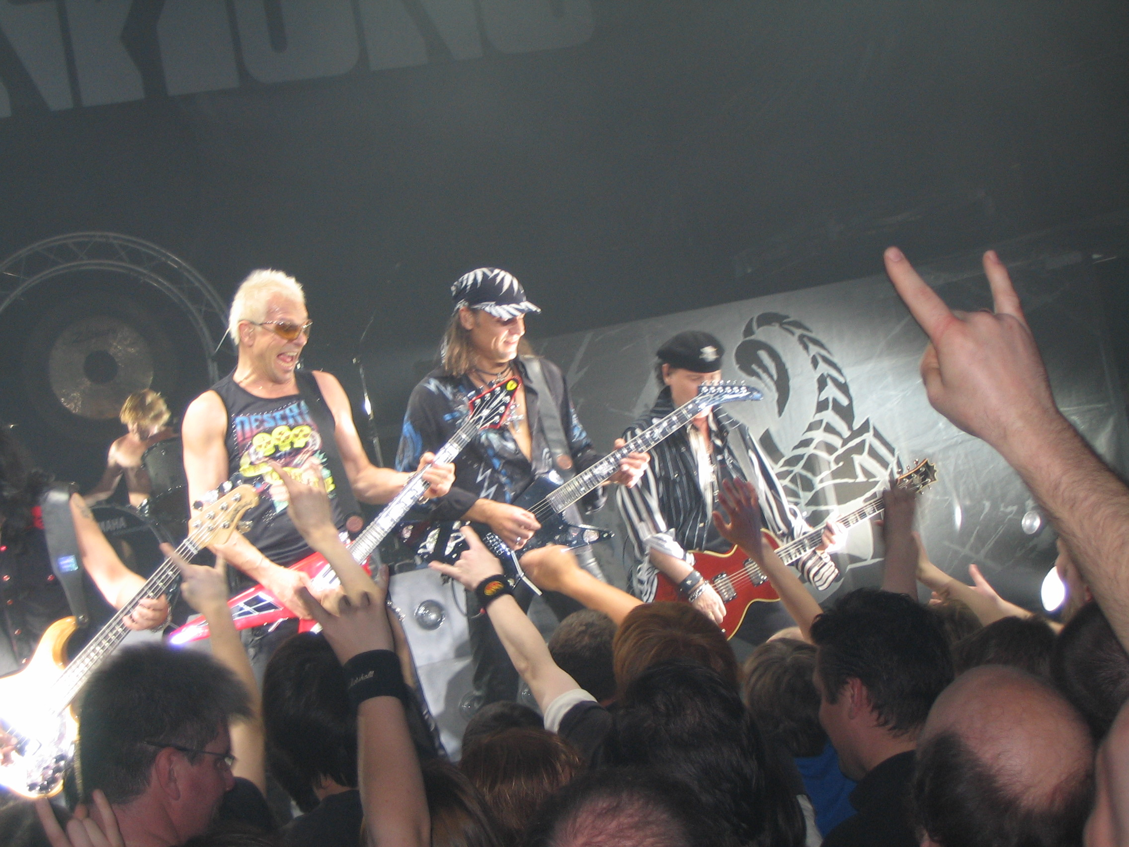 Matthias Jabs, Klaus Meine, Ralph Rieckermann and Rudolf Schenker of Scorpions.